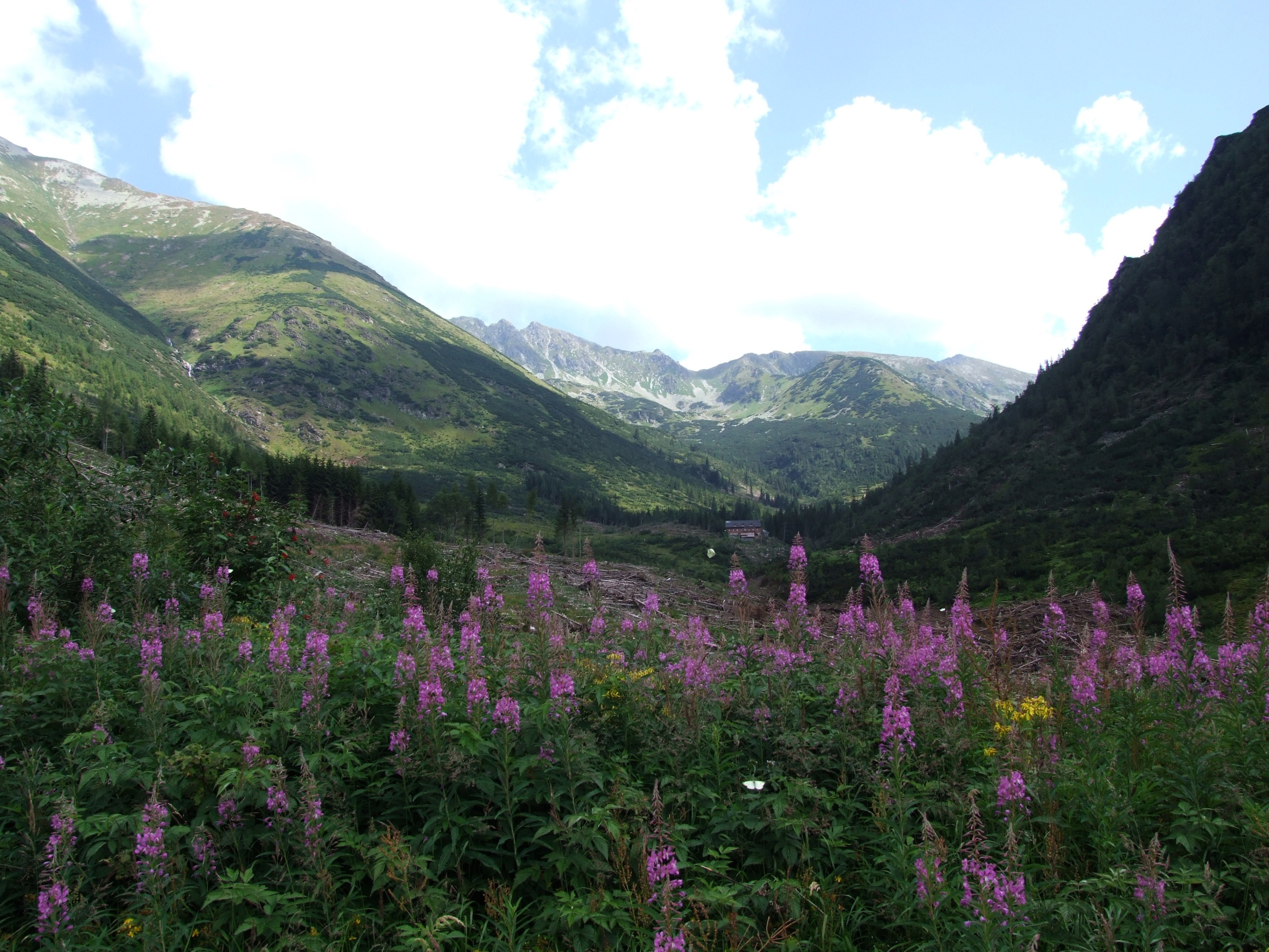 Golina Żarska (Žiarska dolina). Tatry Zachodnie